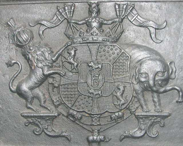 Christian Conrad Danneskiold-Laurvig - ovnsplate